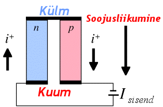 Elektriliselt jadamisi ühendatud P- ja N-tüüpi pooljuhtidele voolu rakendades tekib tänu Peltier efektile soojusliikumine.